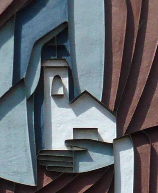 Katholische Kirche St. Joseph in Othfresen.